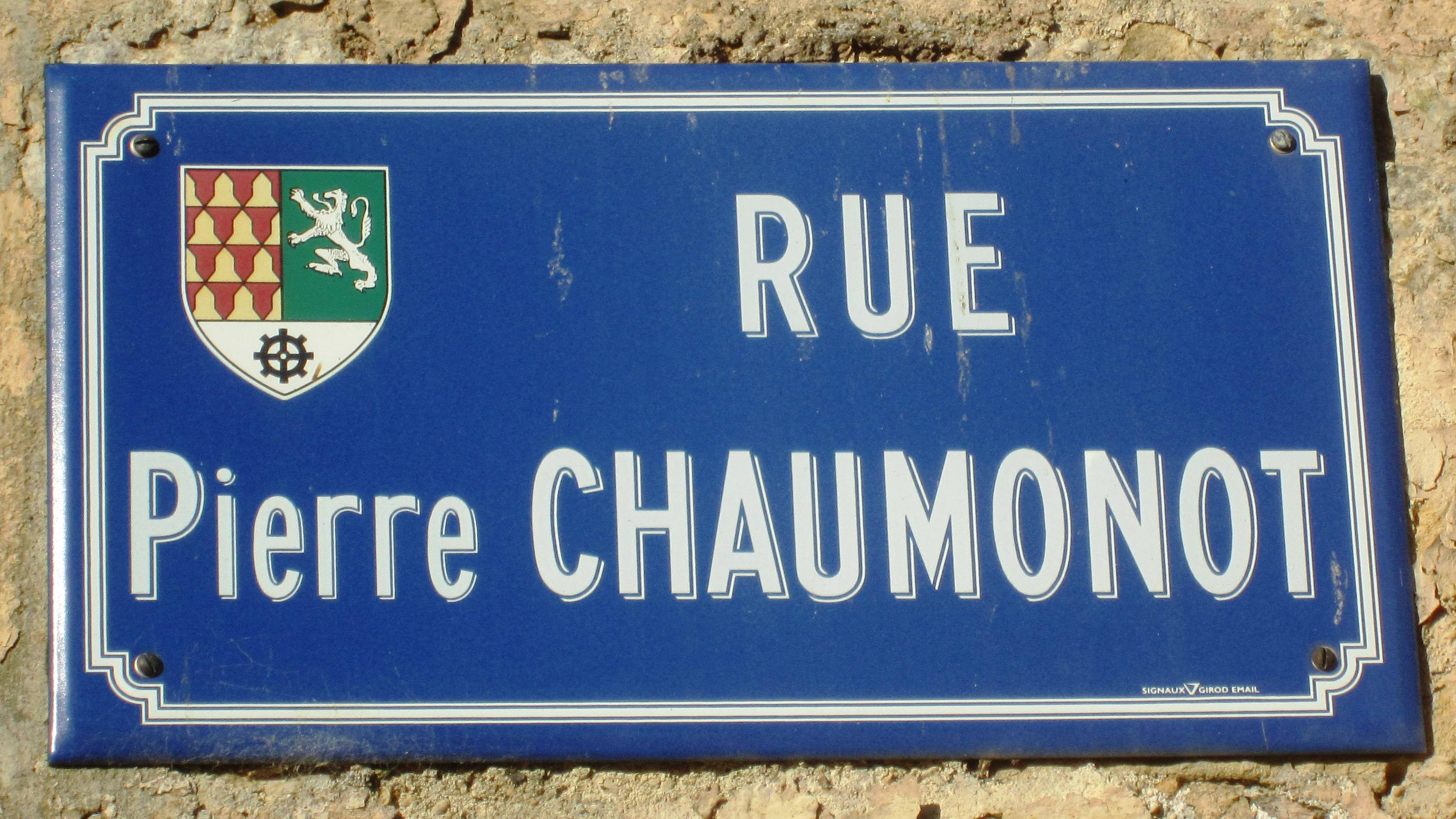 Plaque de la rue Pierre Chaumonot à Sainte-Colombe-sur-Seine